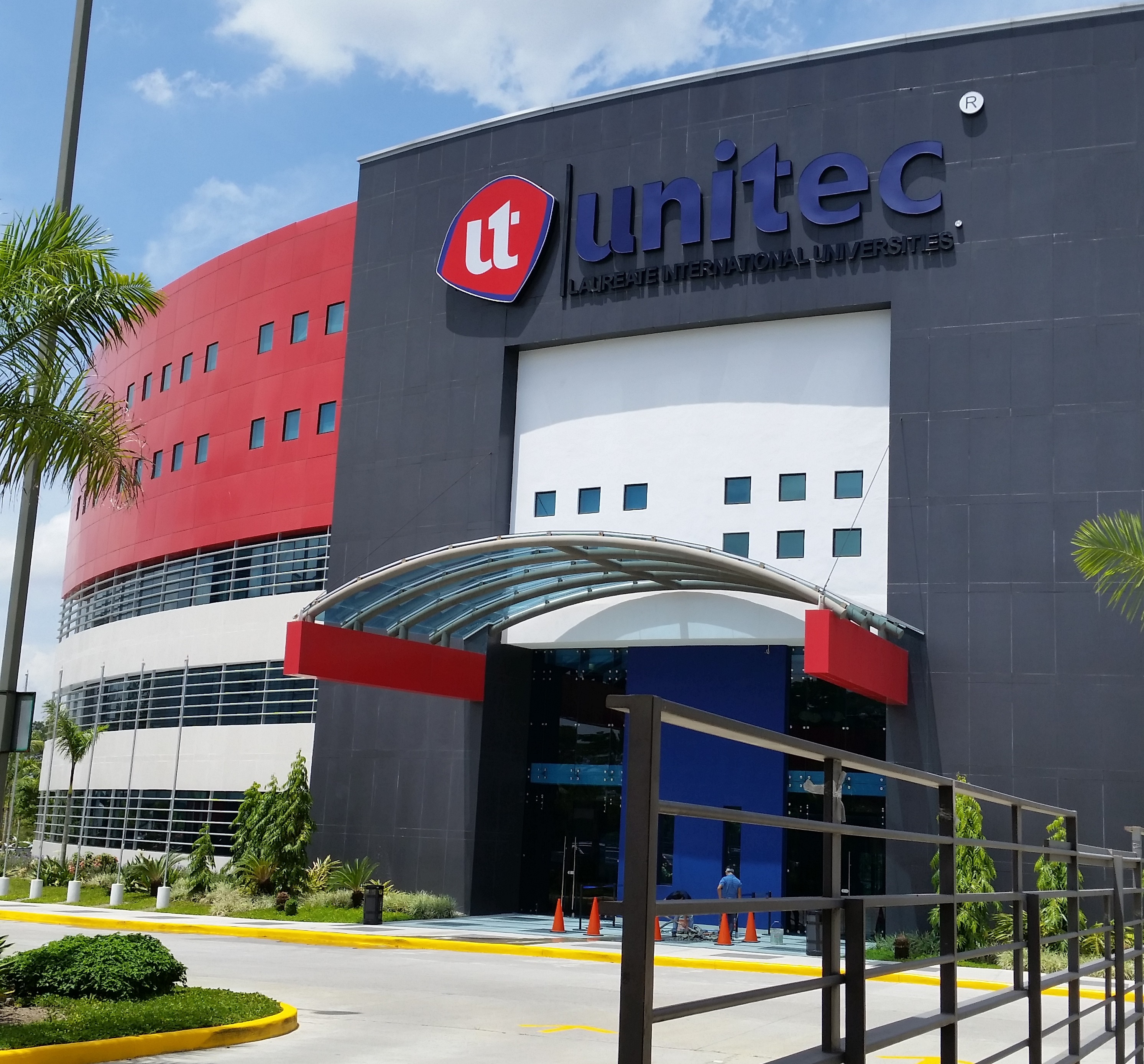 Universidad UNITEC de San Pedro Sula 2015